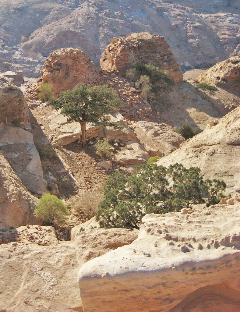 Le wadi pas toujours destructeur avec de la verdure au tournant d’un wadi.